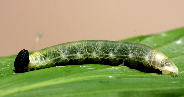 GRASS DEMON Udaspes folus adult larva